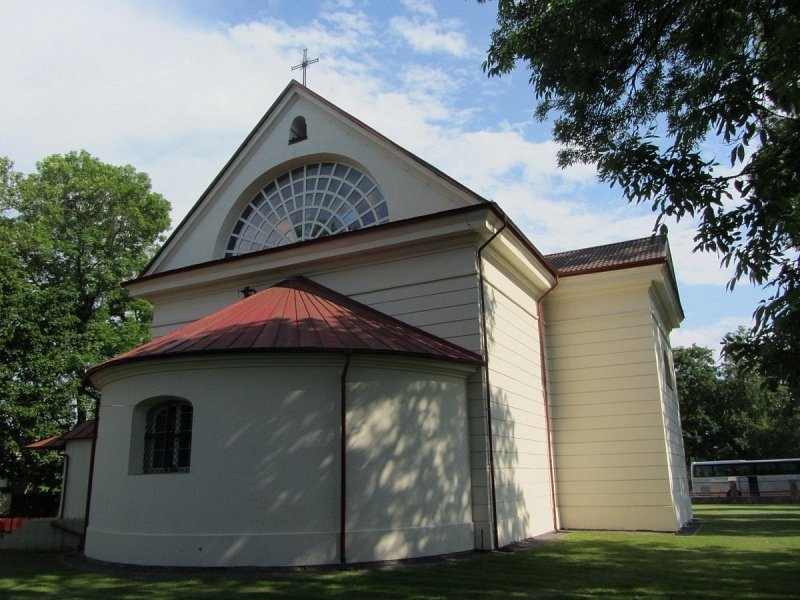 Рось. Касцёл Найсвяцейшай Тройцы